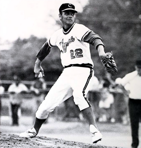 Ron Musselman